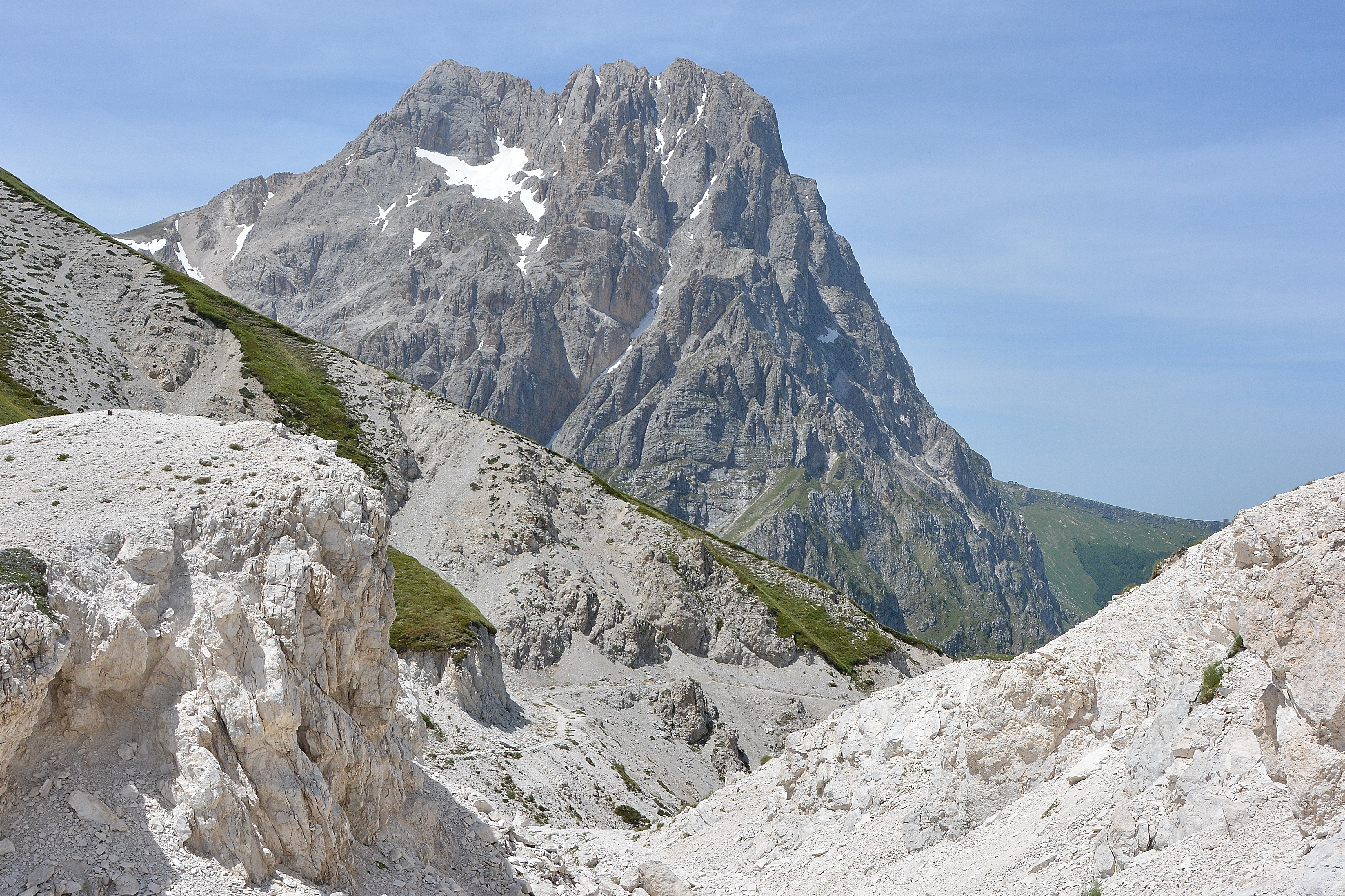 parco nazionale del Gran Sasso e Monti della Laga (Q1027914)